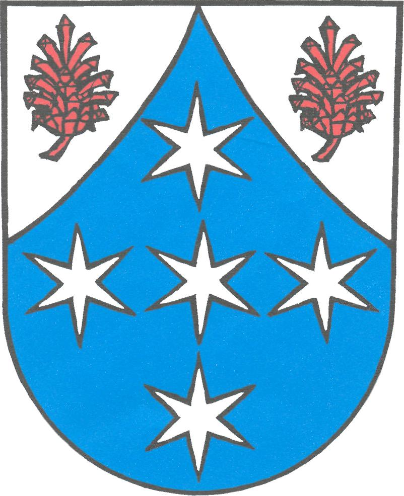 Znak obce Borovník